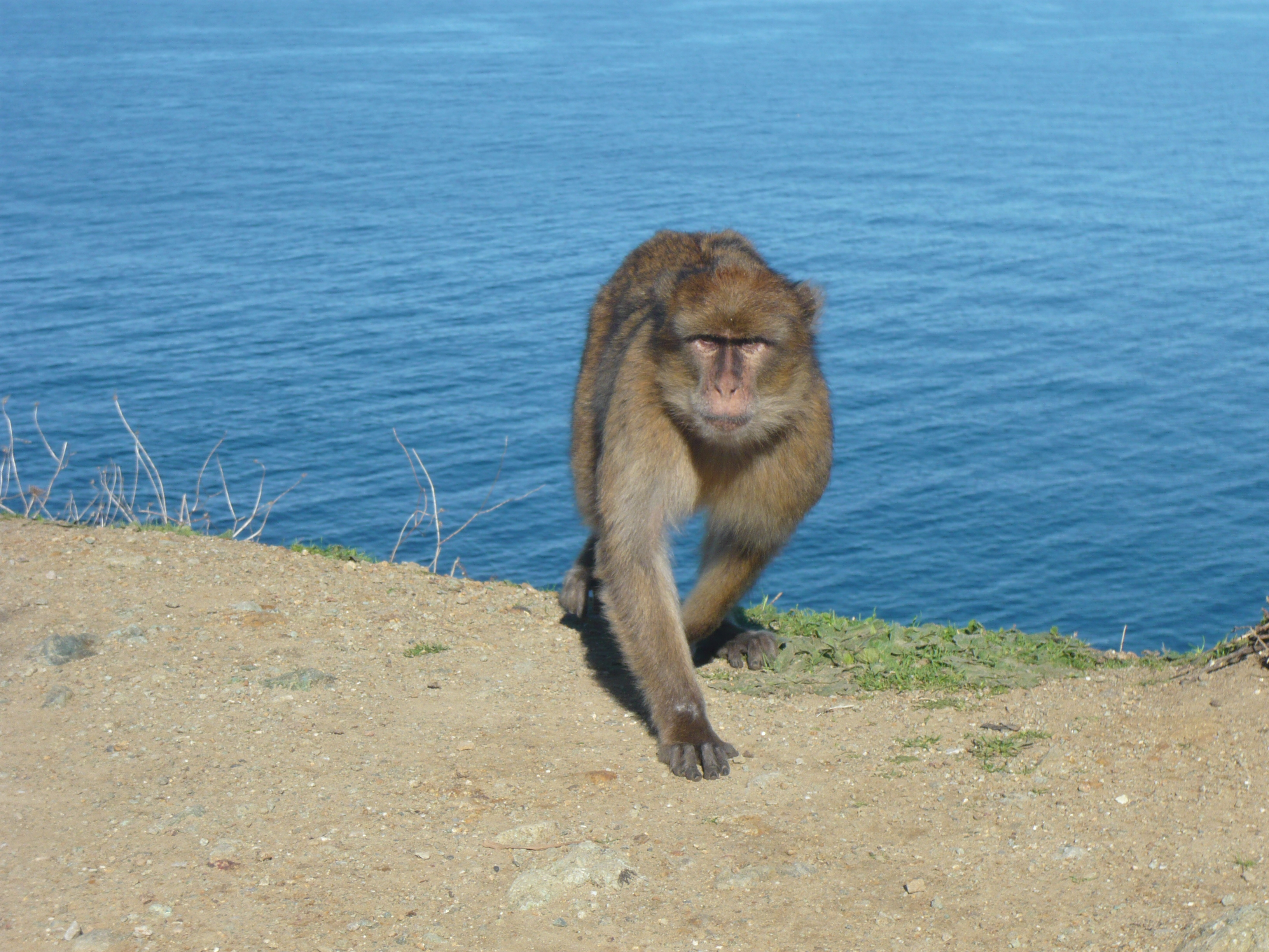 Un m macaque berbère sur les plages d’ El Aouana (Algérie)